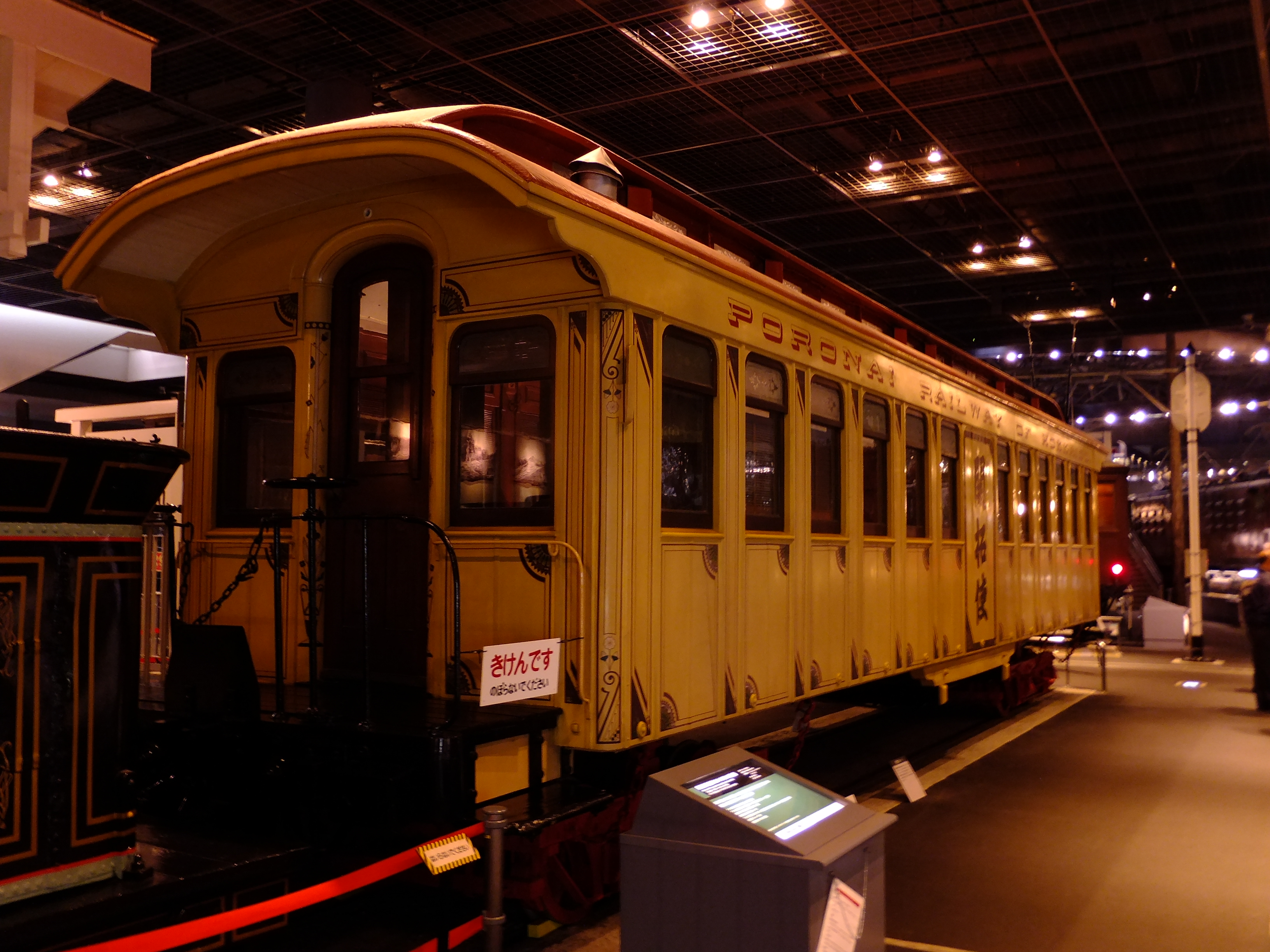 官営幌内鉄道「開拓使号」客車（コトク5050）、さいたま市・鉄道博物館にて